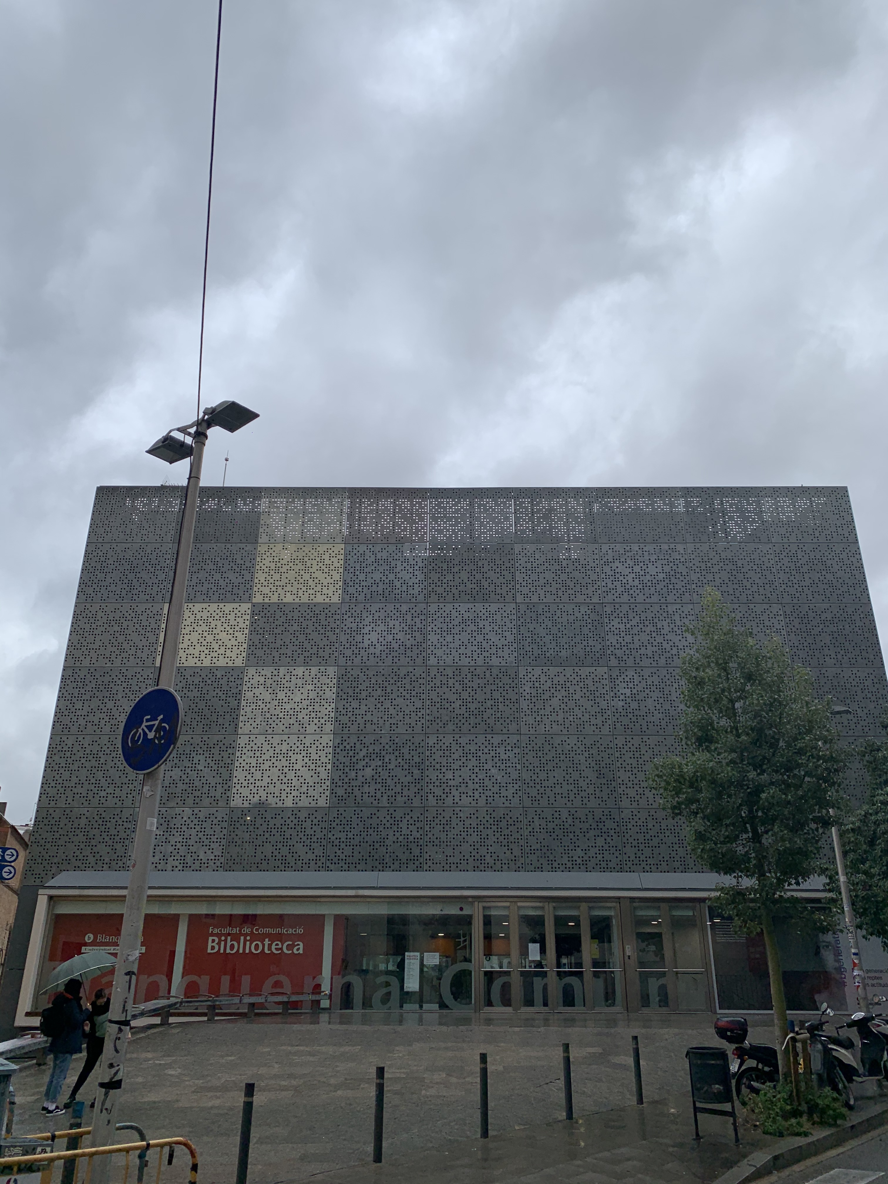 Biblioteca